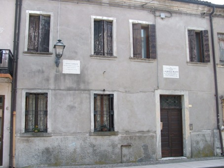 autore: groucho85 fonte:groucho85 descrizione:Lendinara, casa di Alberto Mario licenza d'uso: pubblico dominio note: foto fatta da me, groucho85, per wikipedia